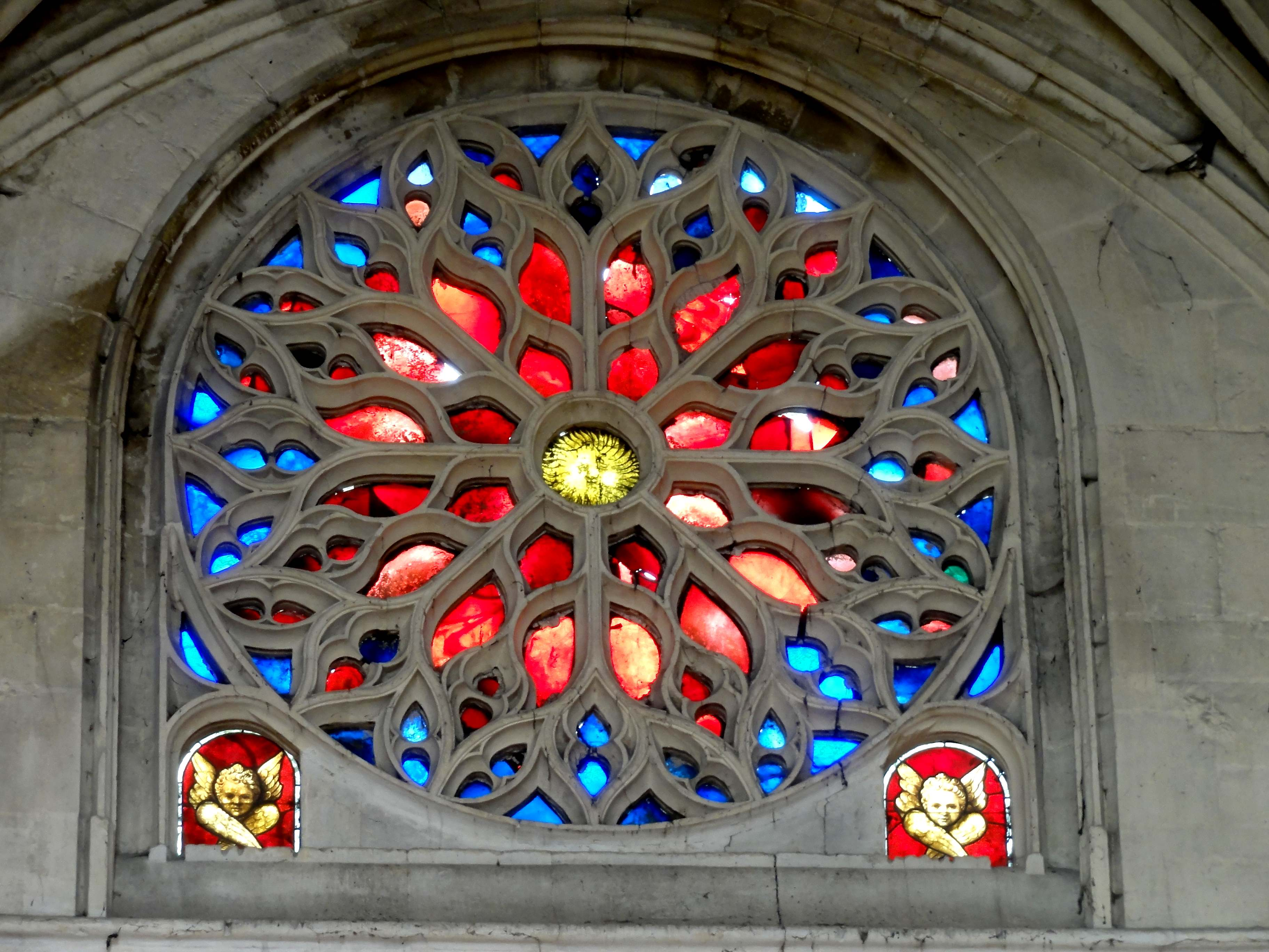 D'après Louis Régnier, p. 86, les vitraux de cette rosace datent du XVIe siècle.